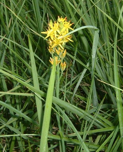 Beenbreek (Narthecium ossifragum)